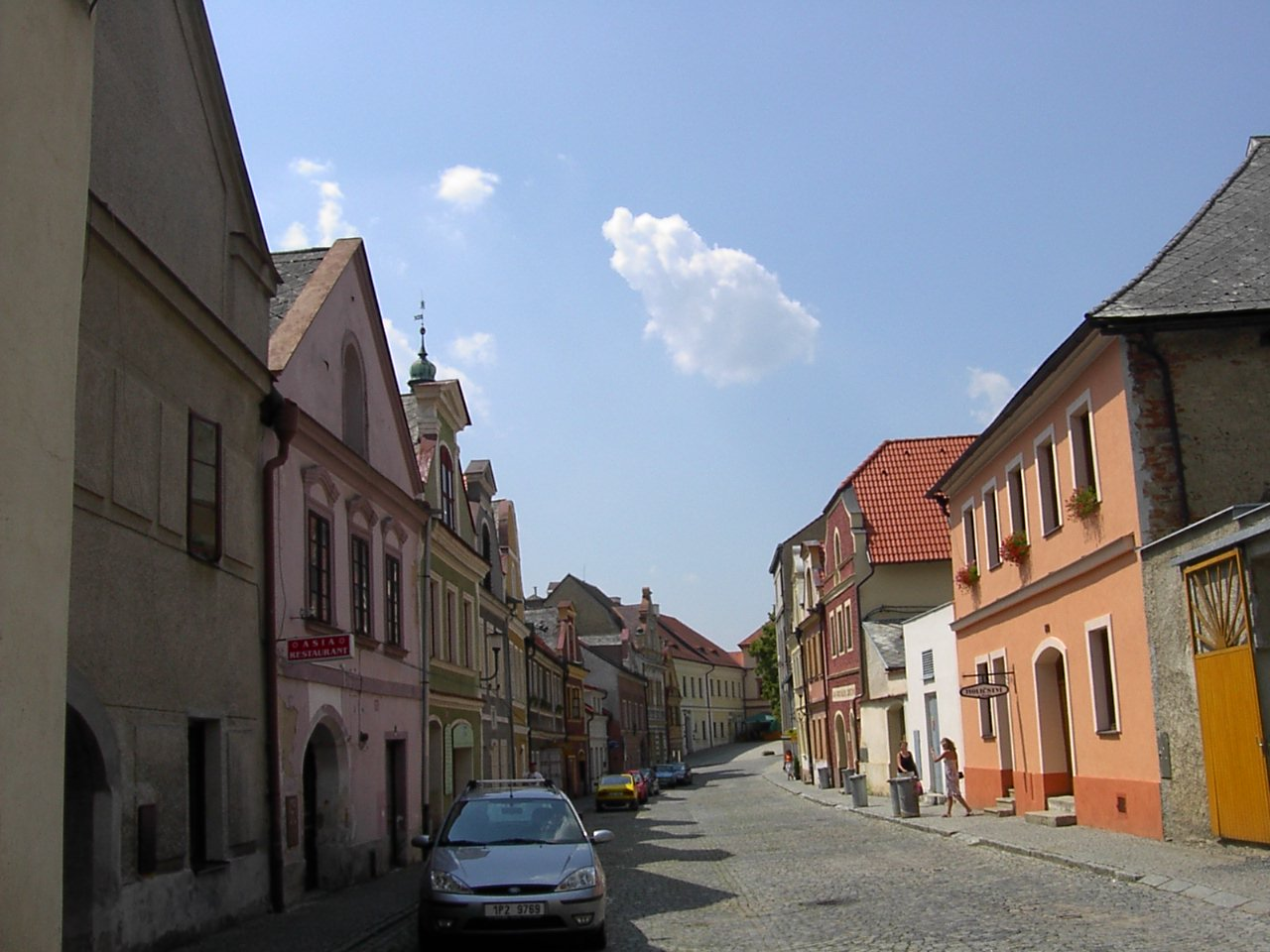 Historické domky ve Vodní ulici v Domažlicích.